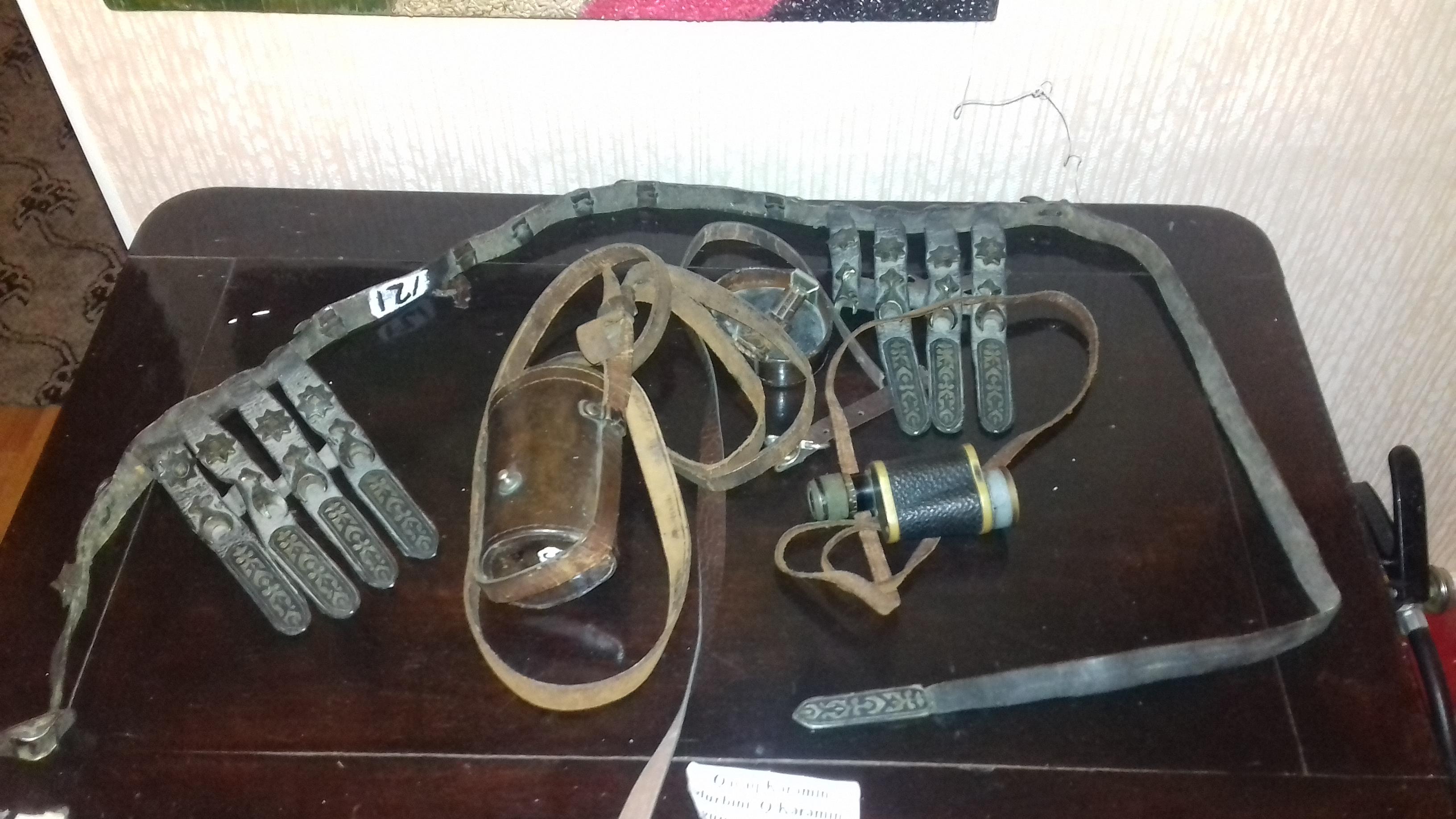 Qaçaq Kərəmin durbini, Hüseyn Arifin ev muzeyi